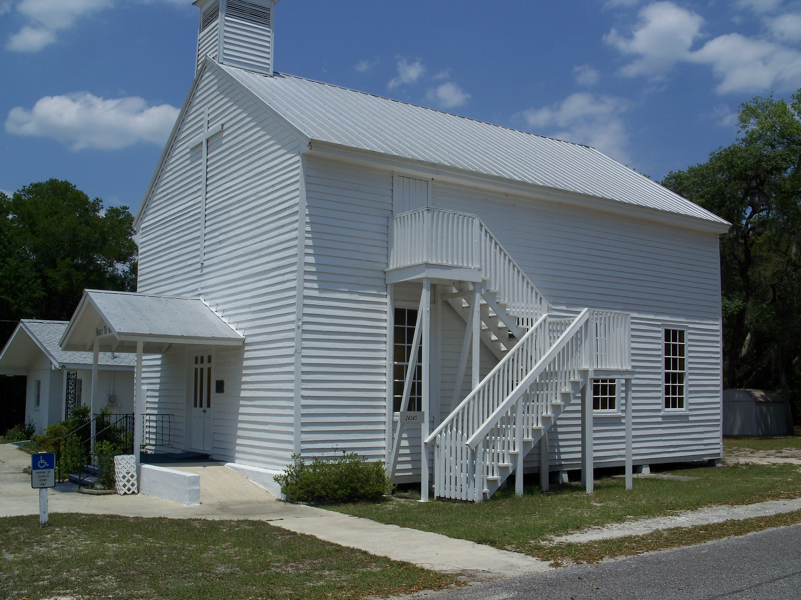 Orange Springs Methodist Episcopal Church, in Orange Springs, Florida